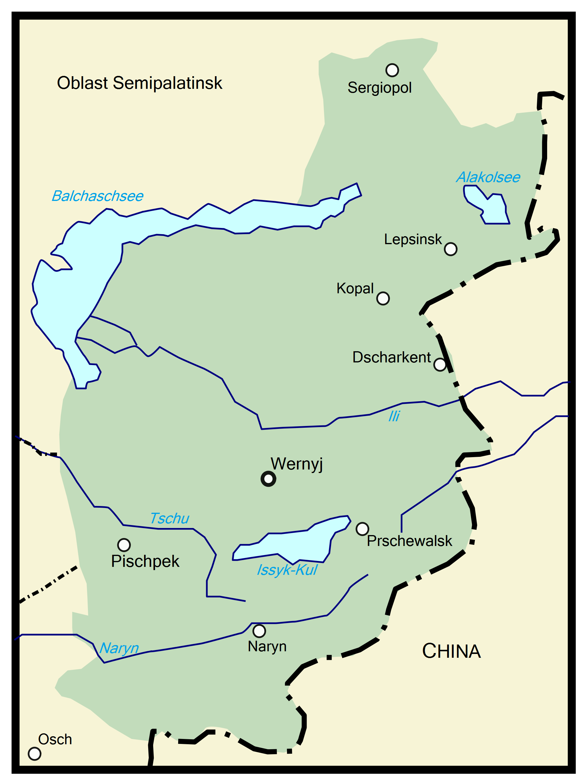 Семиреченская область в 1900 году в Российской империи.